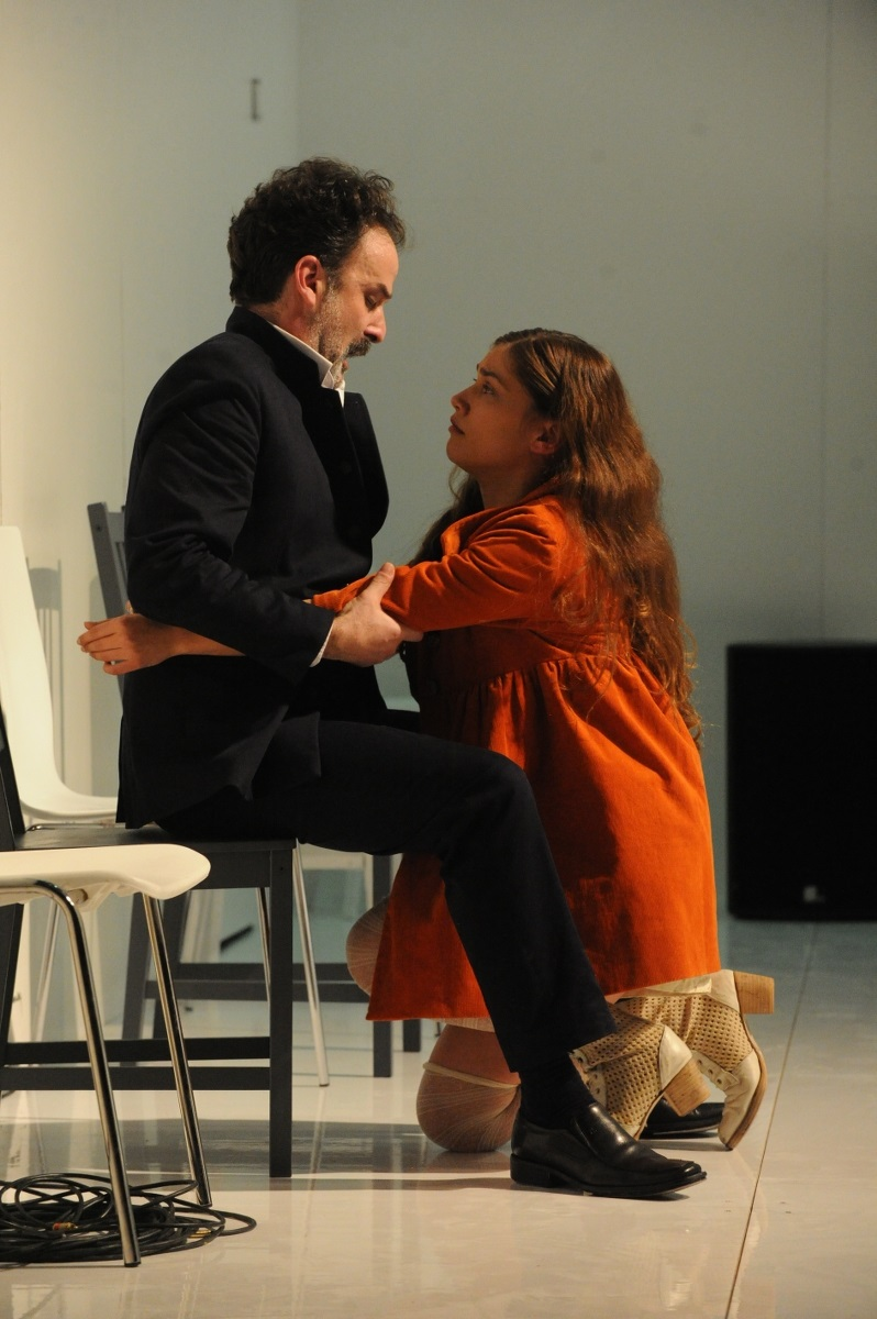 אמיר קריאף וגלוריה בס בהצגה "איפיגניה" מאת אוריפידס, בבימויו של גדי רול, בתיאטרון באר שבע, 2012